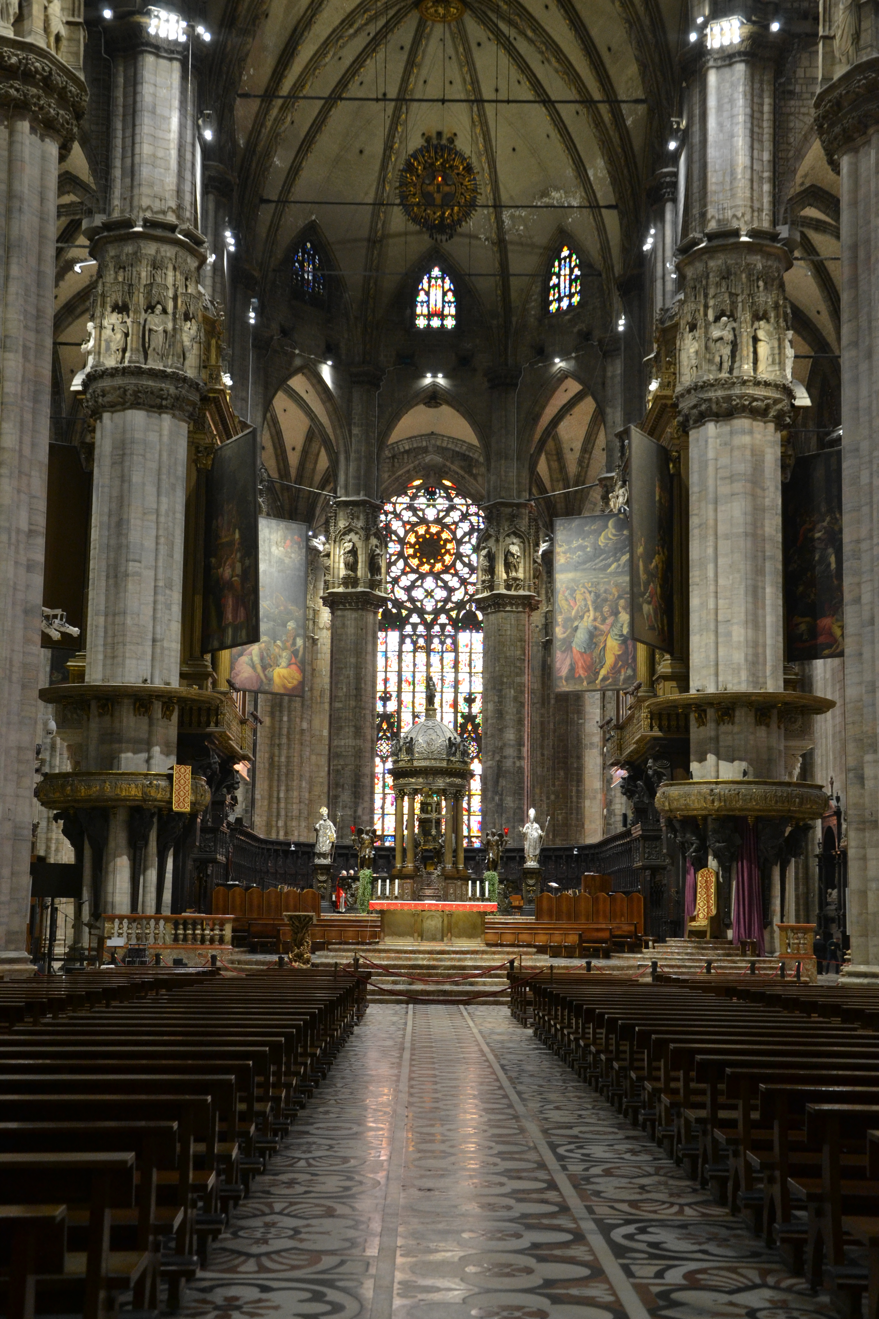 Duomo (Milano)